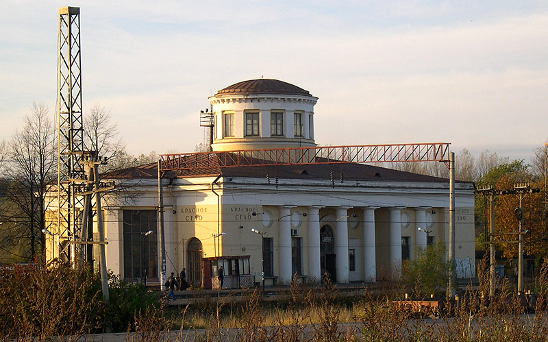 Bahnhof Krasnoje Selo. Krasnoje Selo Красное Село.